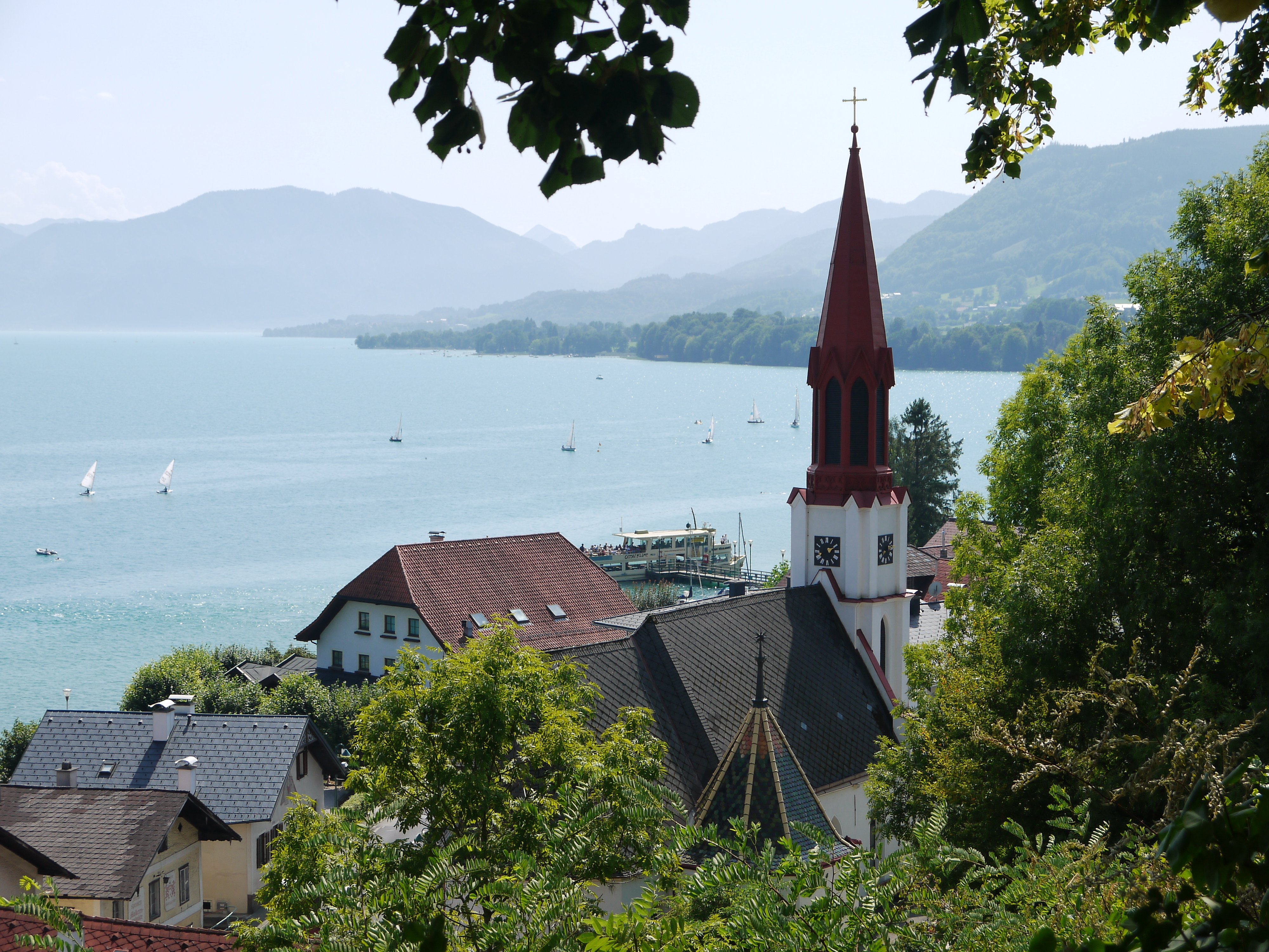 Evang. Filialkirche, Martinskirche und Friedhof